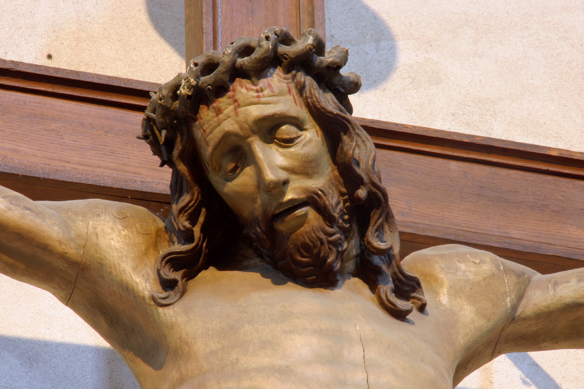 Groß St. Martin, Köln. Kreuzigungsgruppe des Tilman van der Burch, 15./16. Jahrhundert. Detail: Kopf des Gekreuzigten